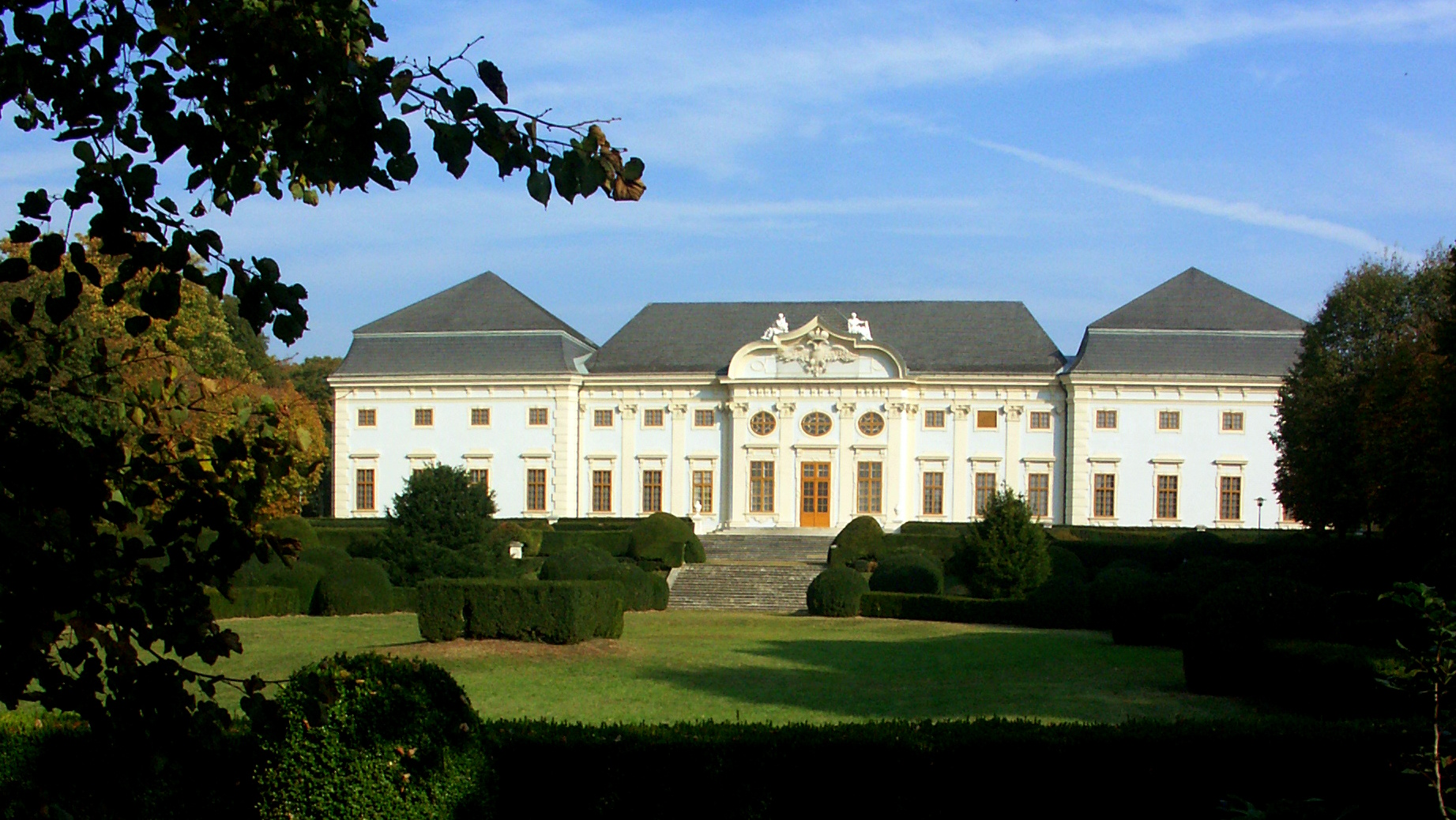 Schloss Halbturn